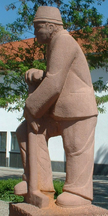 Torfstecher in Maudach als Verweis auf den Torfabbau im Maudacher Bruch